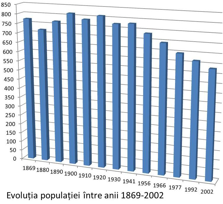 Grafic - Evoluţia populaţiei între anii1869-2002 - Bucovăţ (Dumbrava), Timiş